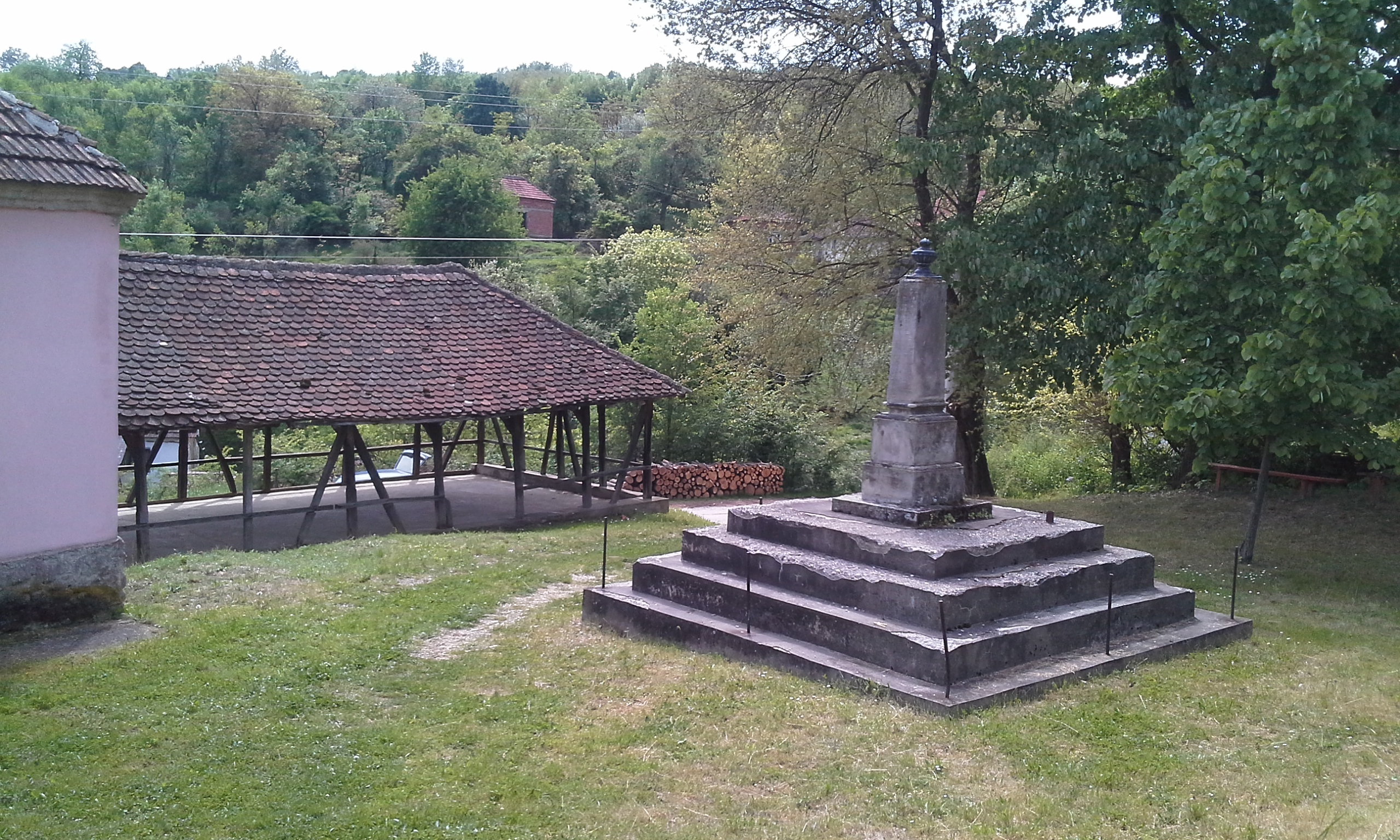 Споменик у порти капеле у Горњем Рачнику са капелом у позадини